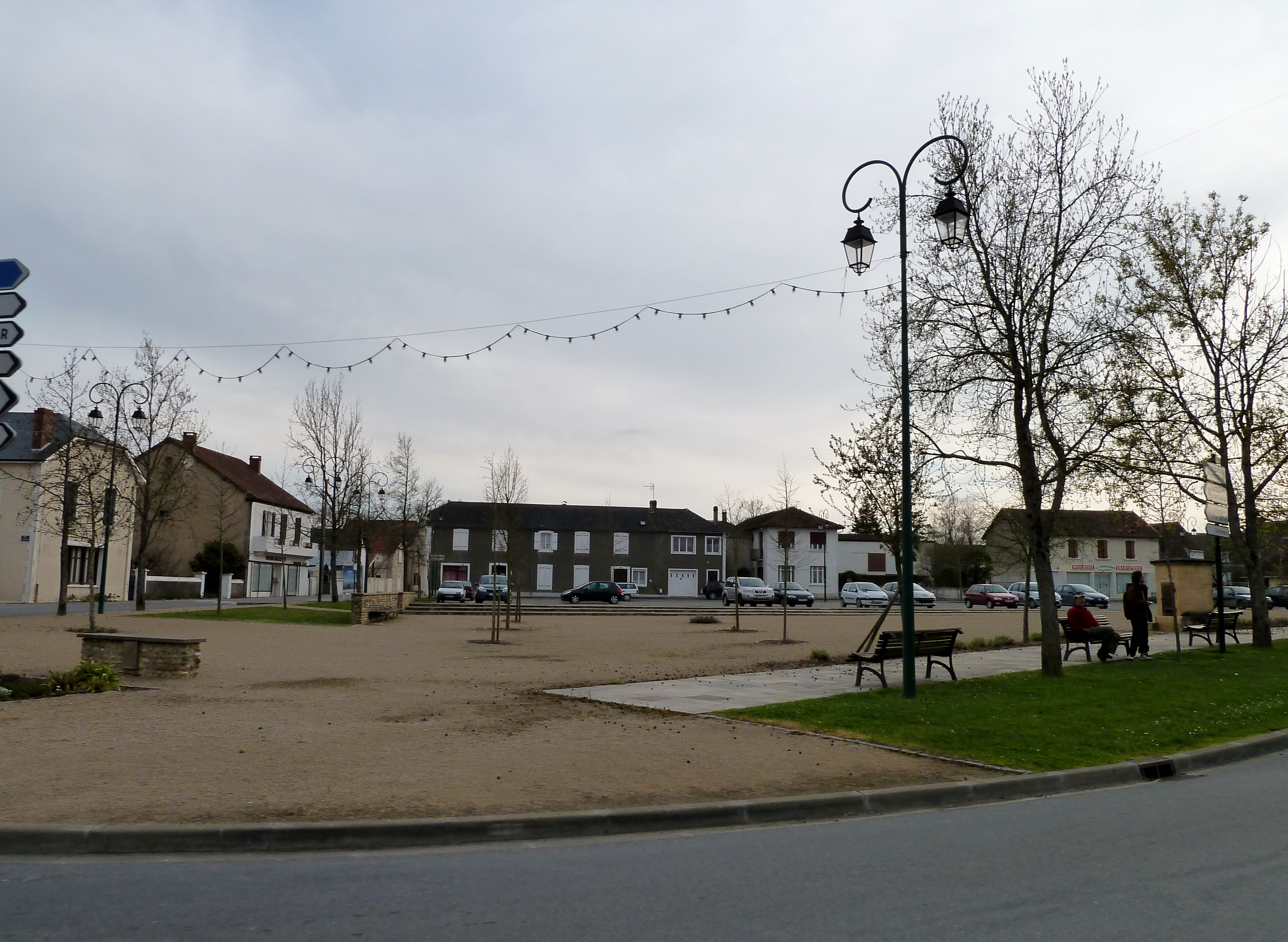 Place centrale de Garlin